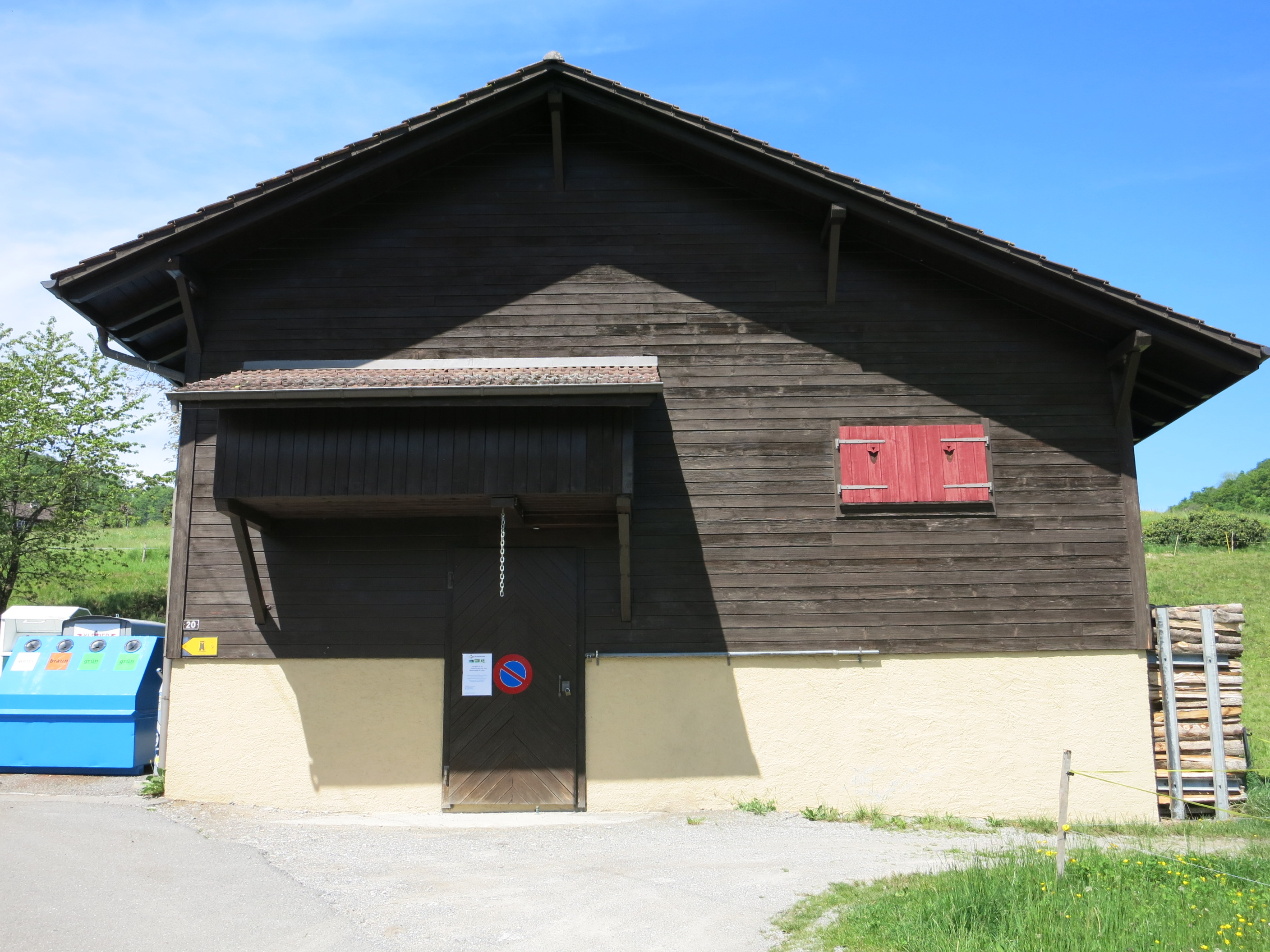 Artilleriewerk Faulensee, Spiez BE, Schweiz